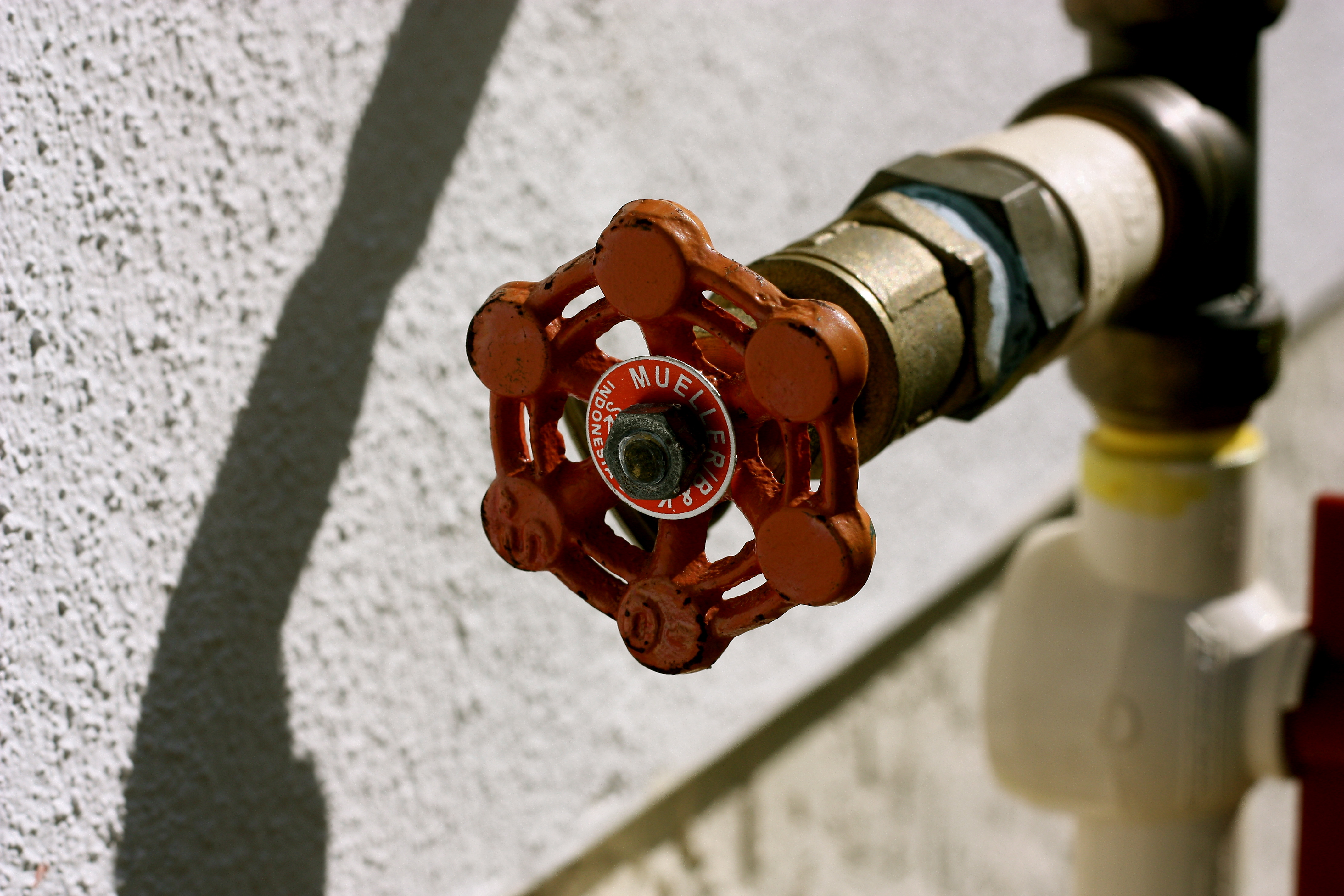 Twist Me